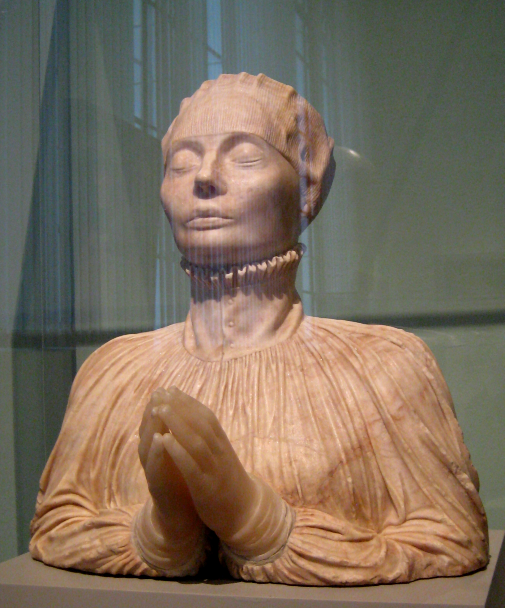 Корнелис II Флорис де Вриендт. Портрет герцогини Доротеи Прусской. Бюст с надгробия из Кенигсбергского собора. Алебастр. 1548. Кисти рук выполнены в 19 веке. Реставраторы Т. Кох (1980-е), В. Черемхин.